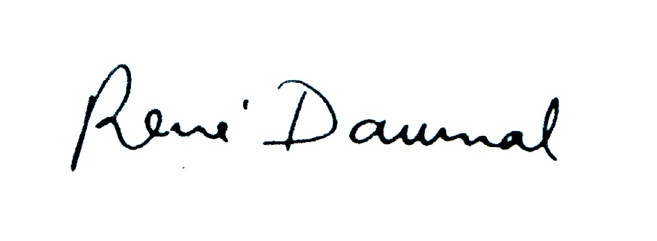 Signature de l'écrivain français René Daumal. Scan d'après lettre manuscrite. This signature is believed to be ineligible for copyright and therefore in the public domain because it falls below the required level of originality for copyright protection both in the United States and in the source country (if different). In this case, the source country (e.g. the country of nationality of the signatory) is believed to be France. Cette image ou le texte qui y est représenté est seulement composé de formes géométriques simples et de texte. Elle n’atteint pas le seuil d'originalité nécessaire pour la protection du droit d’auteur, et est donc du domaine public.